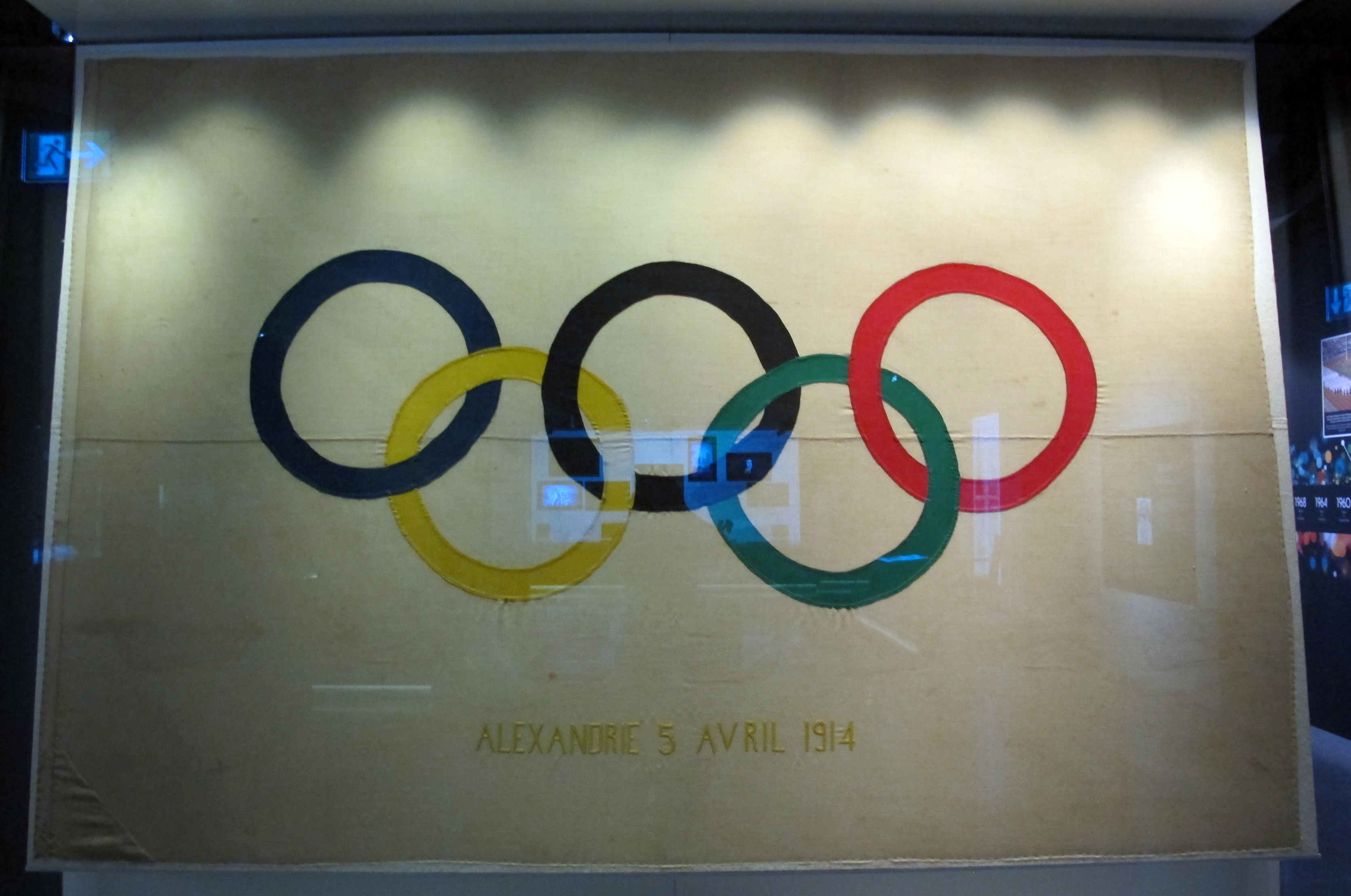 Musée Olympique, Losanna